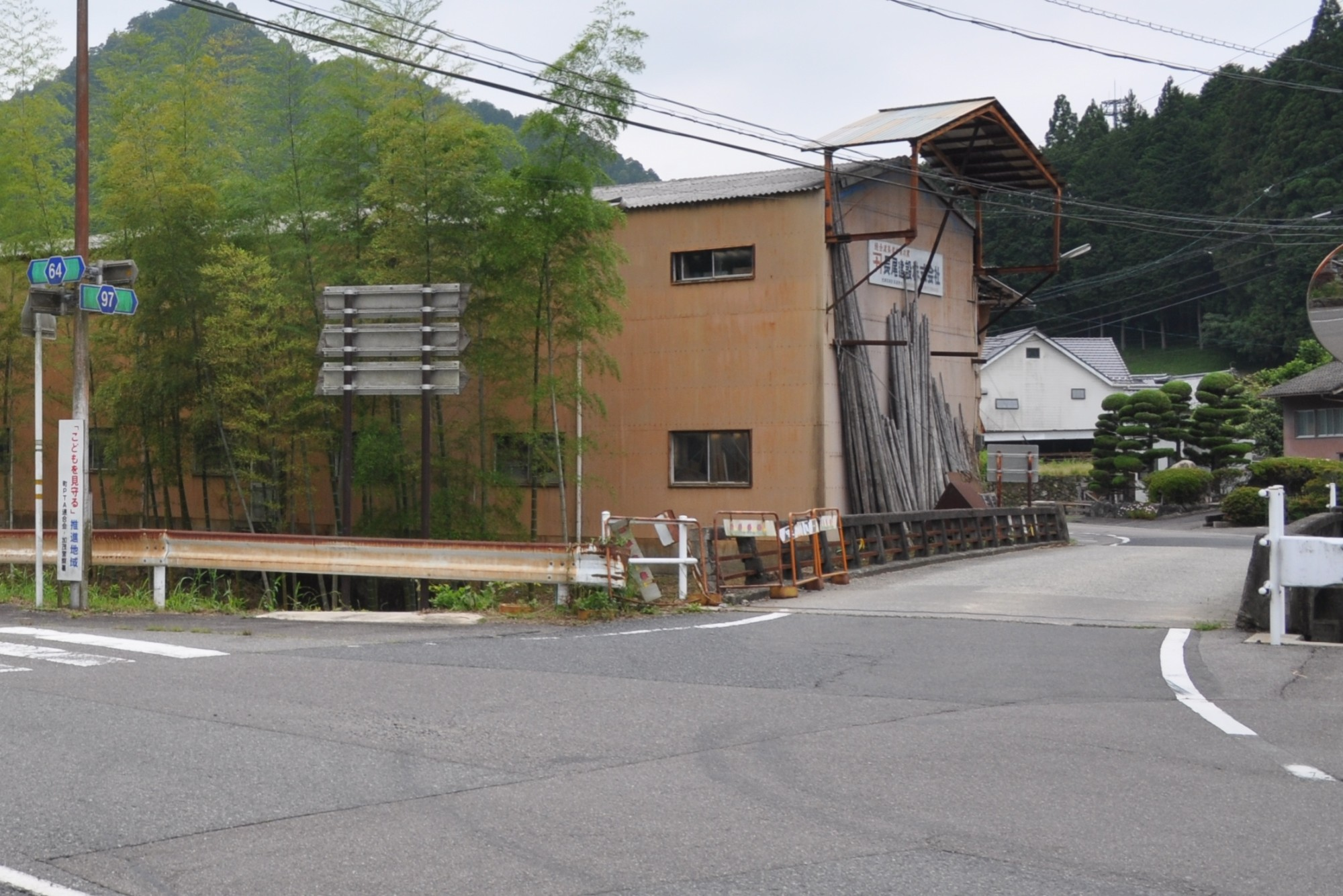 岐阜県道97号・七宗町神淵地内